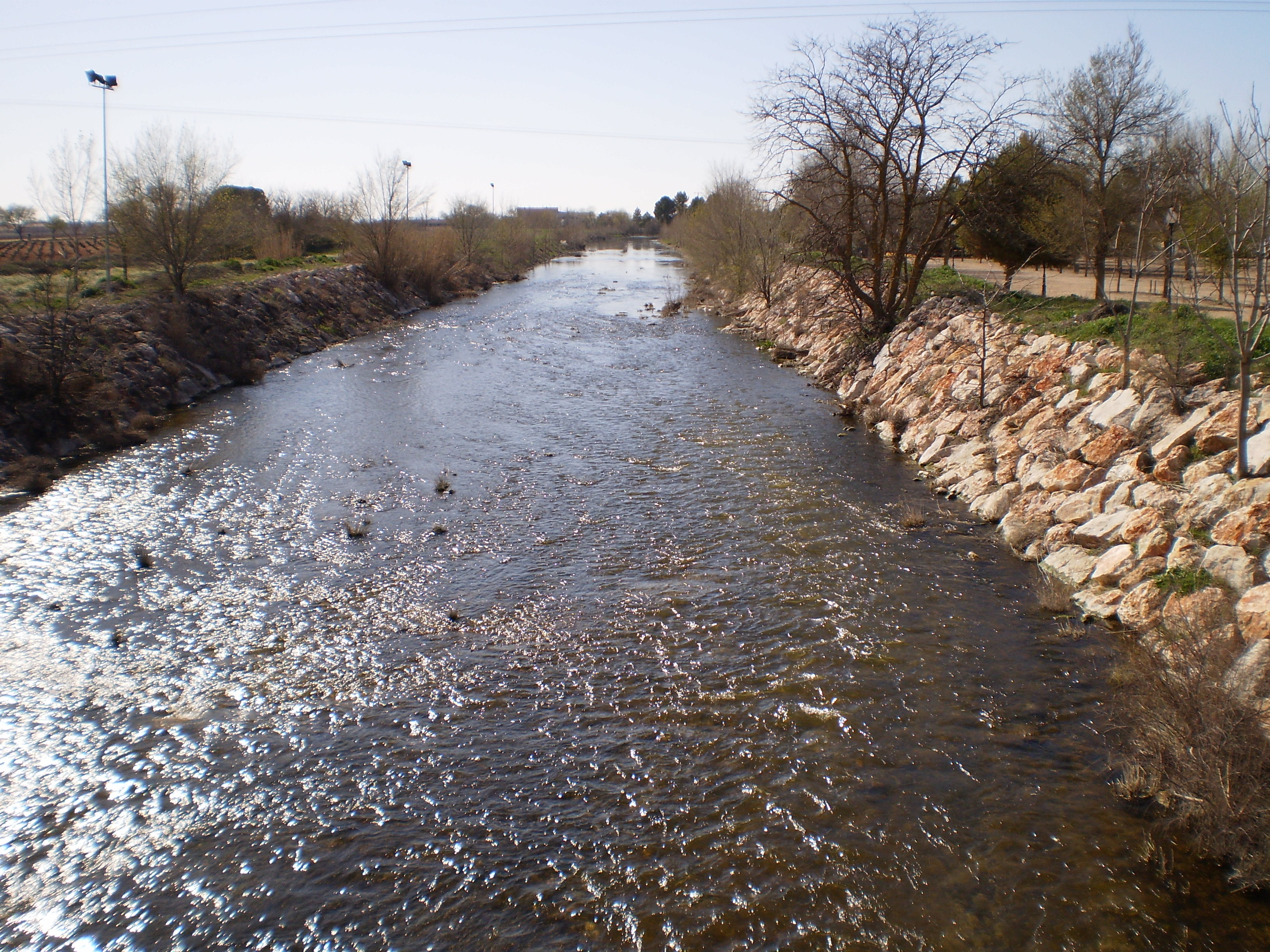 Río Záncara con agua a la altura de Pedro Muñoz.